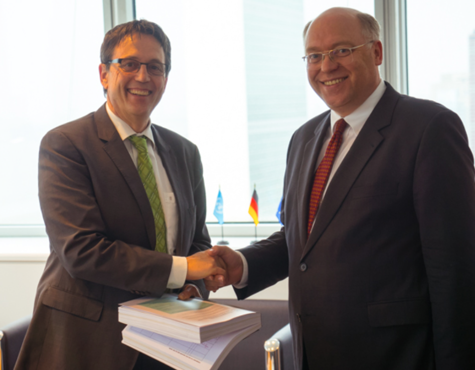 Dietmar Roller (links) übergibt die Petition bei der Ständigen Vertretung Deutschlands bei den Vereinten Nationen an Reinhard Krapp (rechts)